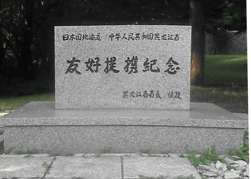 日本の北海道と中国の黒龍江省の友好提携を記念した碑。1986年6月14日に建立された。北海道開拓記念館の西側の草地脇に建てられている。